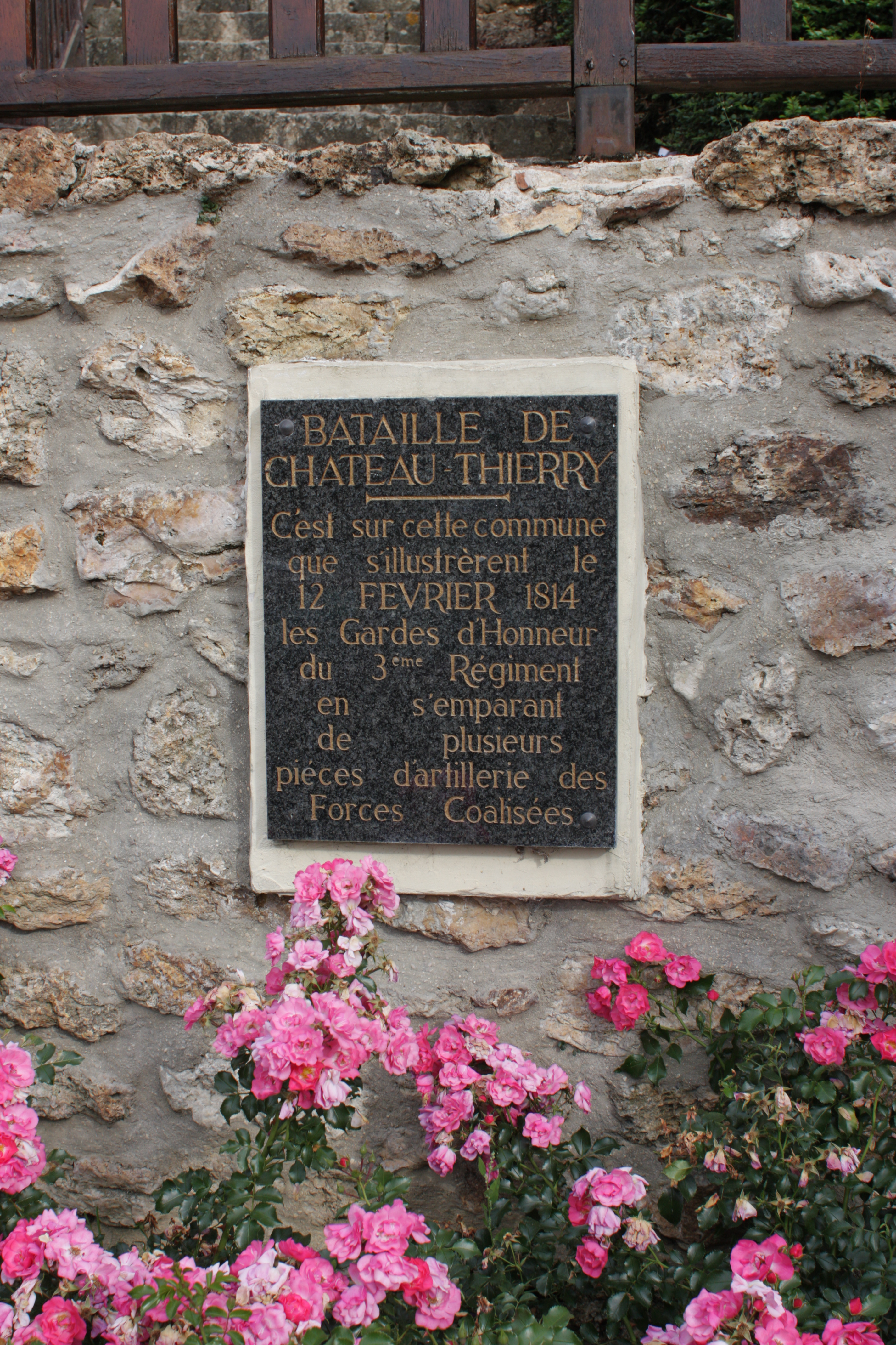 Plaque commémorative de la bataille de 1814 à Viffort, dans l'Aisne.